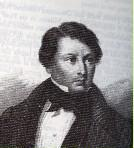 Giovanni Rajberti (1805-1861), poet an Milan's dialect